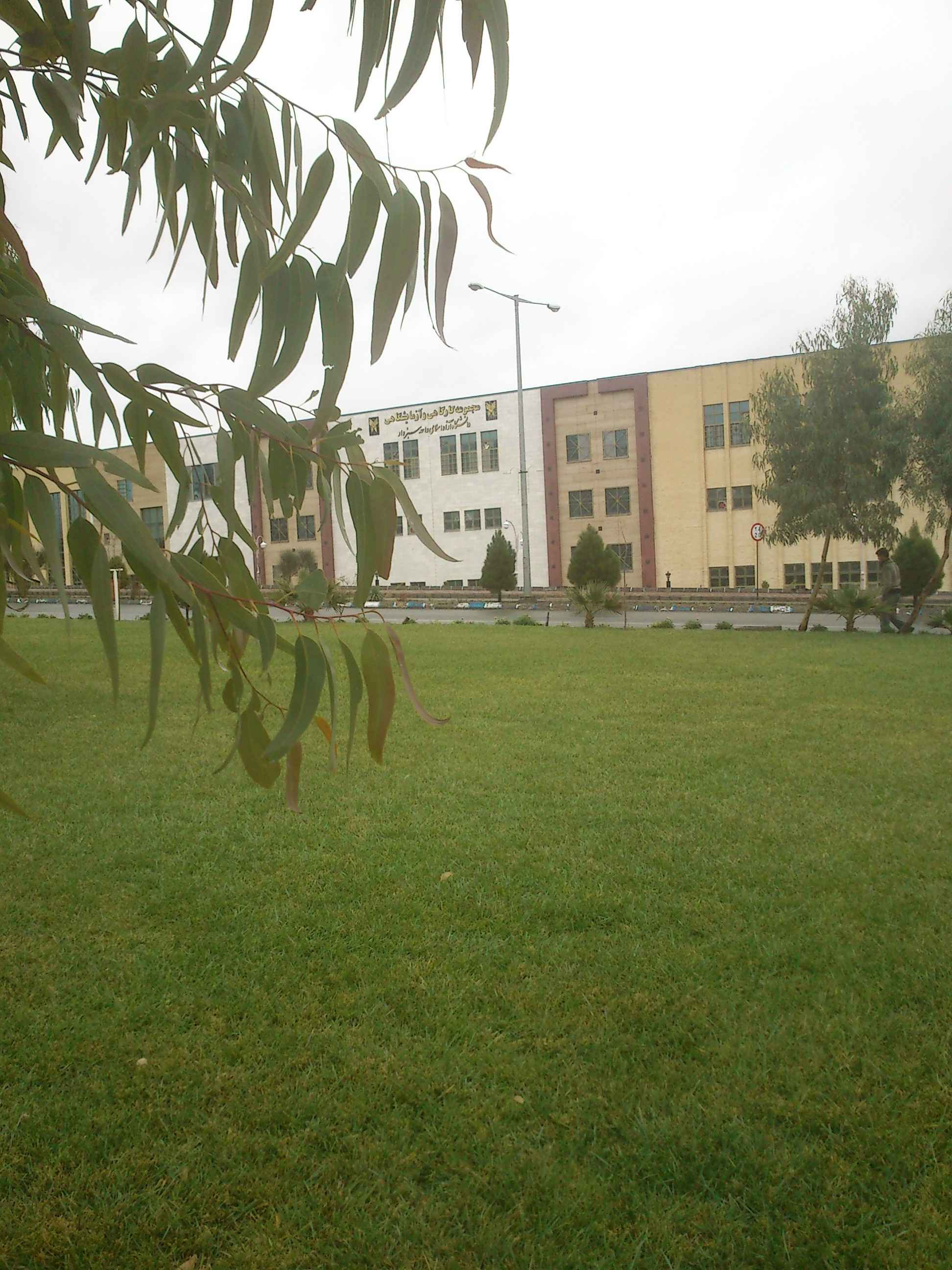 مجموعه آزمایشگاهی و کارگاهی